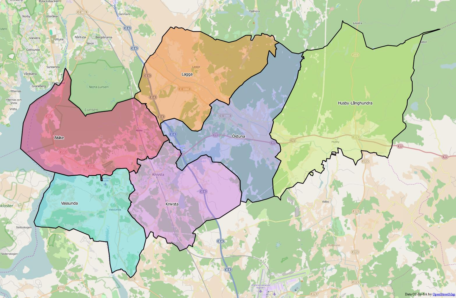 Distriktsindelningen i Knivsta kommun World file: 41.946991771059011 0 0 -41.946991771059011 1957390.83576791267842054 8364503.32766568101942539